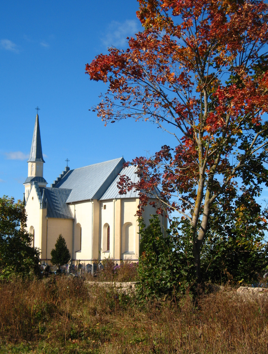 Ражанка, Ražanka, Belarus.